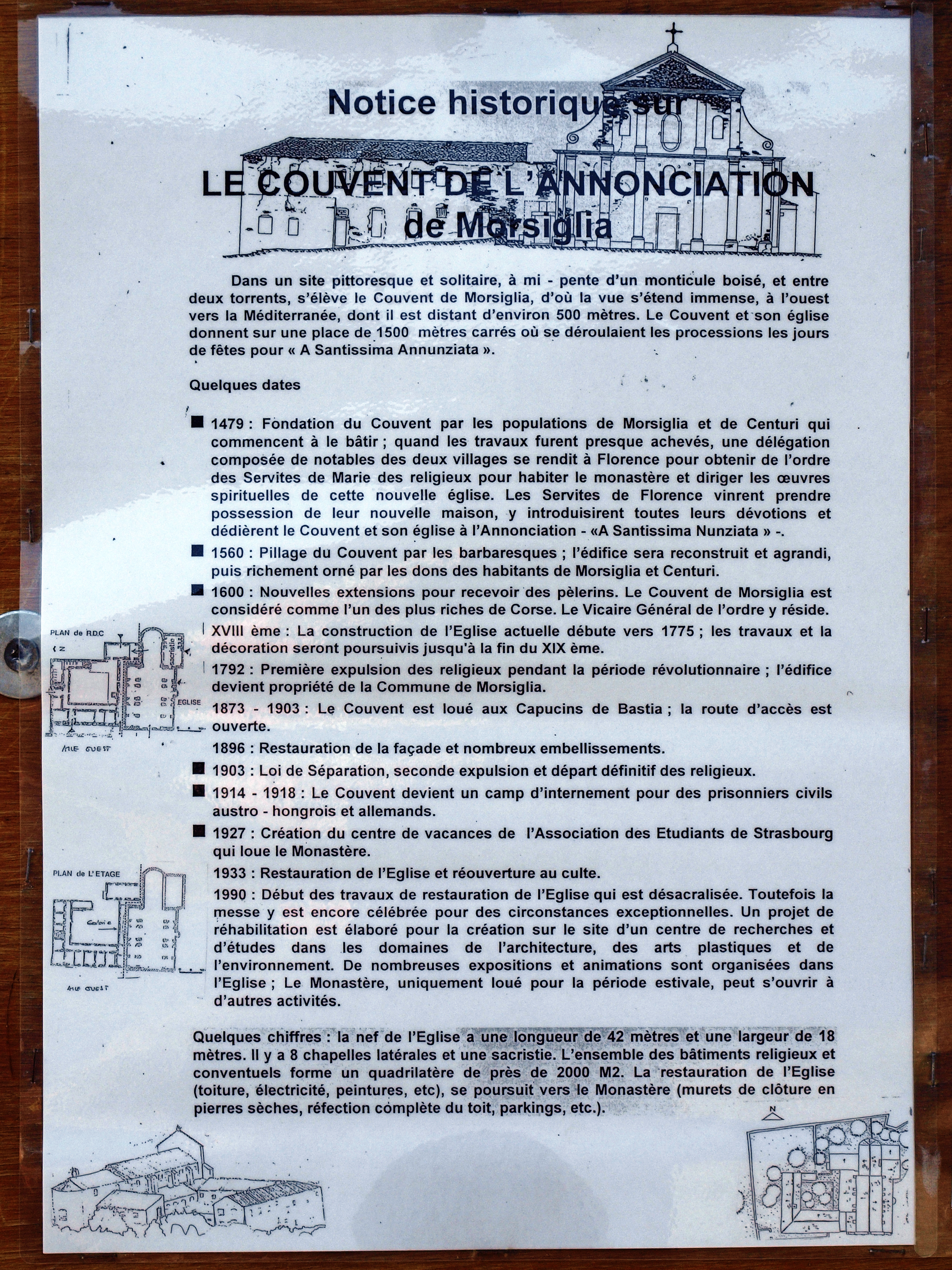 Morsiglia (Corsica) - Notice historique du couvent de l'Annonciation